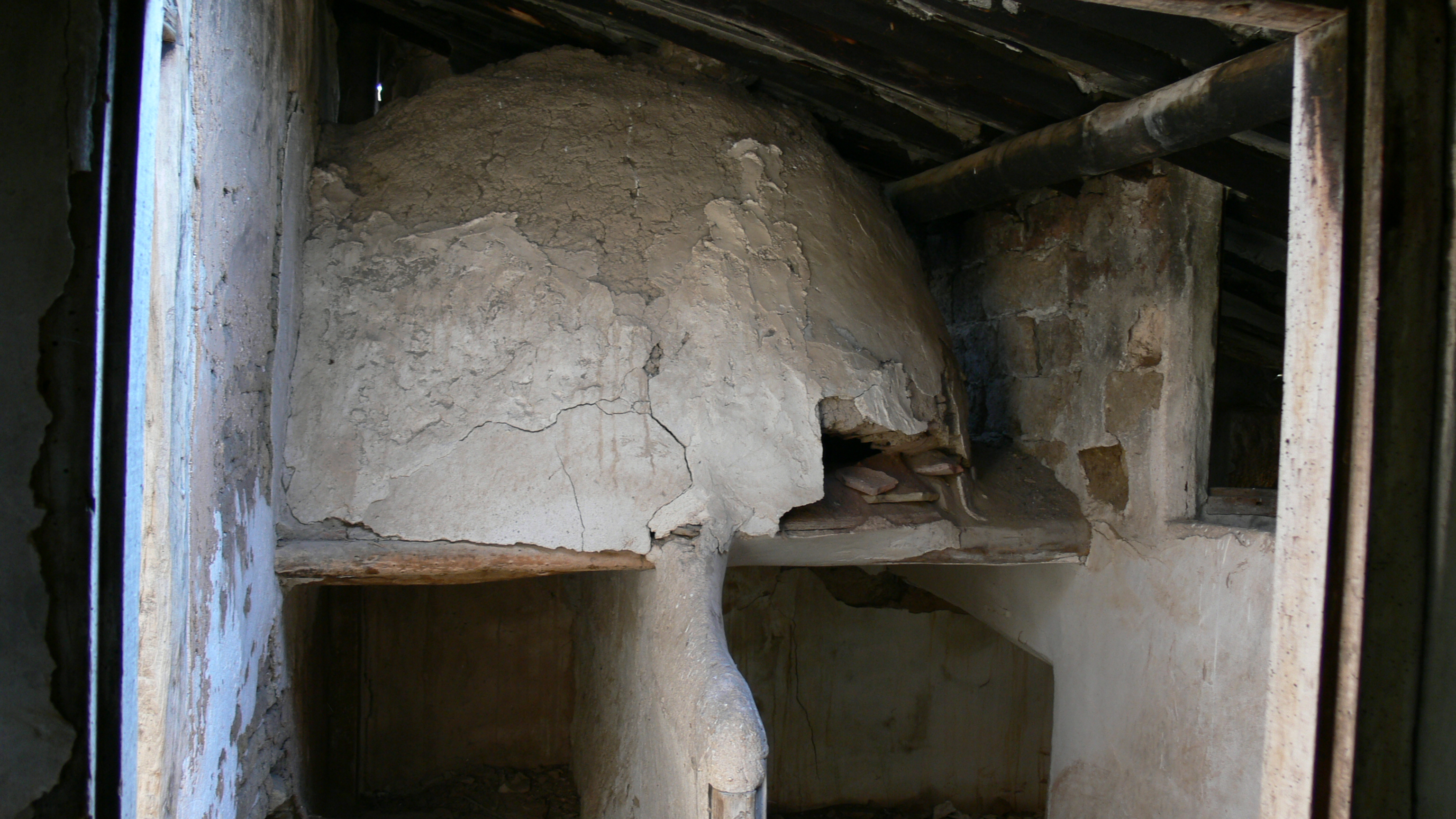 Horno de pan en Villanueva de San Prudencio, despoblado de Lagunilla del Jubera (La Rioja - España).